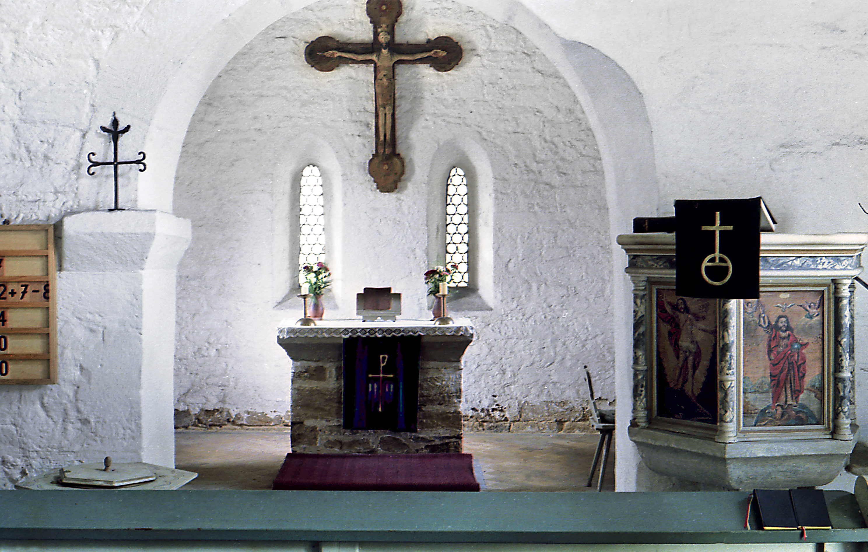 03.07.1985 DDR 6801 [07318] Aue am Berg (Saalfeld-Beulwitz): Kapelle "Aue am Berg", innen Spätgotischer Malaltar um 1500, romanisches Kruzifix 2. Hälfte 12. Jahrhundert (GMP: 50.663676,11.311494). [F19850703A06.JPG]19850703450NR.JPG(c)Blobelt